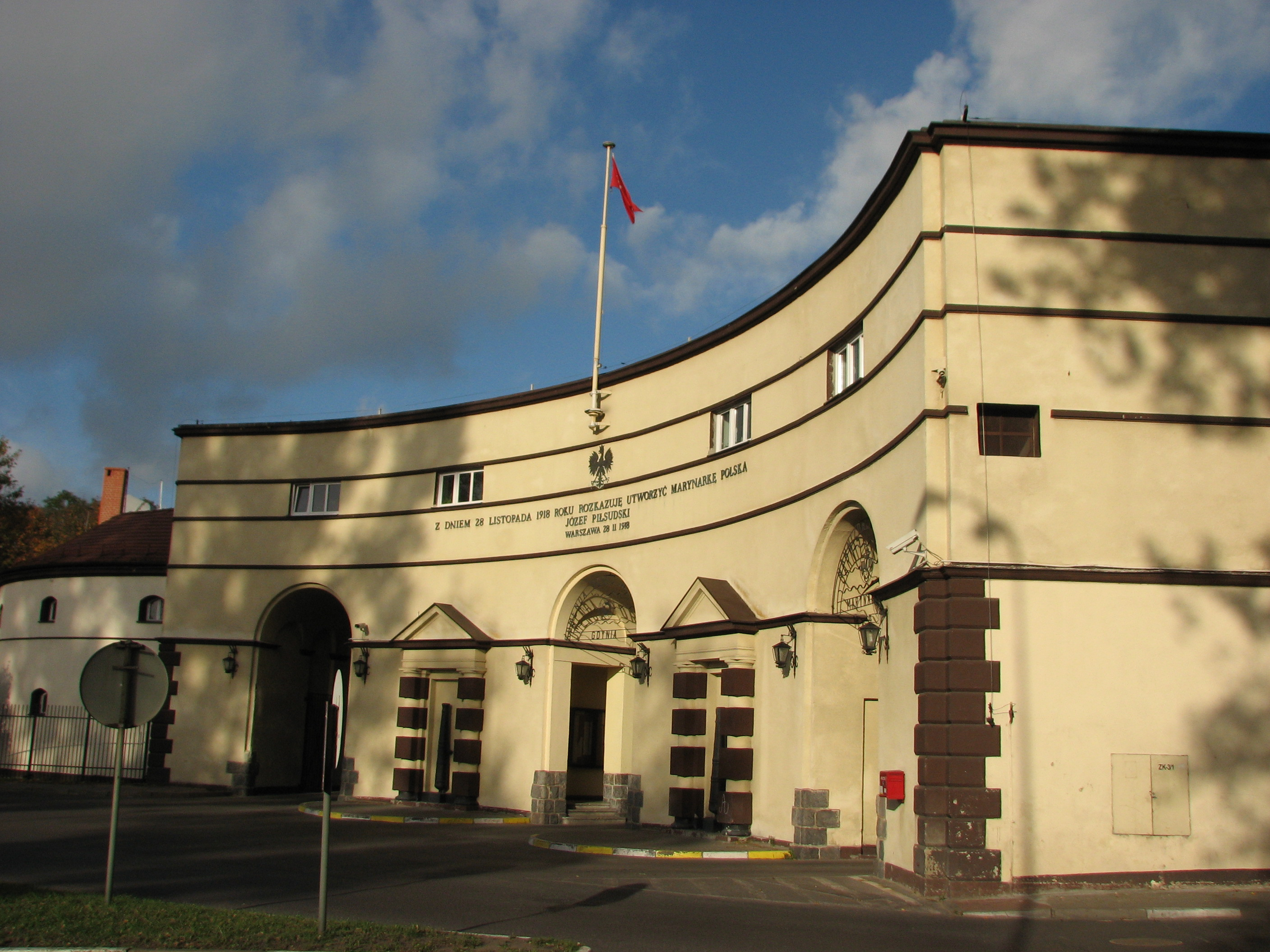 Budynek Komendy Portu Wojennego Gdynia (3 Flotylla Okrętów).